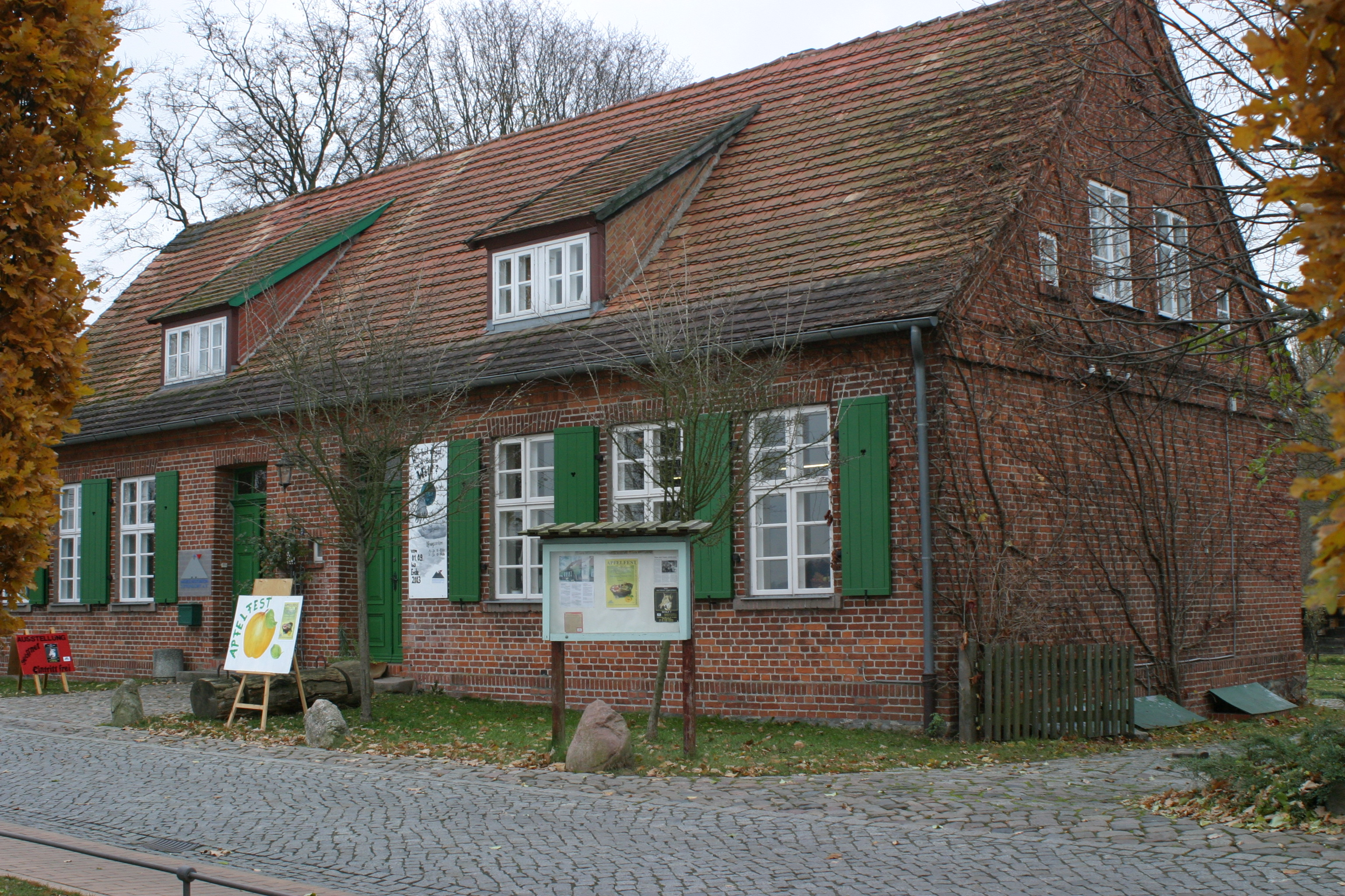 Vorderansicht der Naturschutzstation Zippendorf